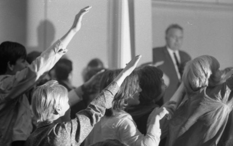 Bundeskanzler Kiesinger auf dem Kommunalkongress der CDU-CSU in Frankfurt/Main (Palmengarten)